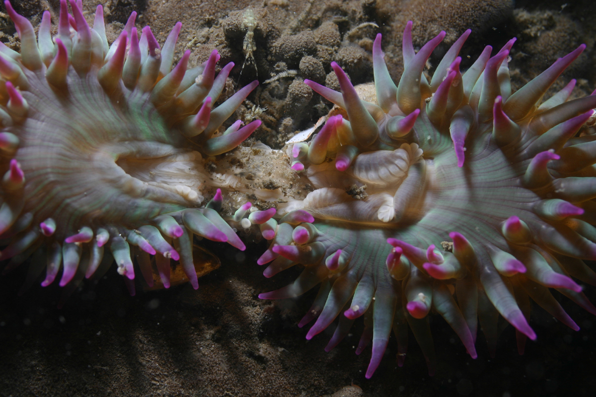 Anthopleura elegantissima dividiéndose en dos, mediante reproducción asexual por fisión. Moss Landing, EE.UU.